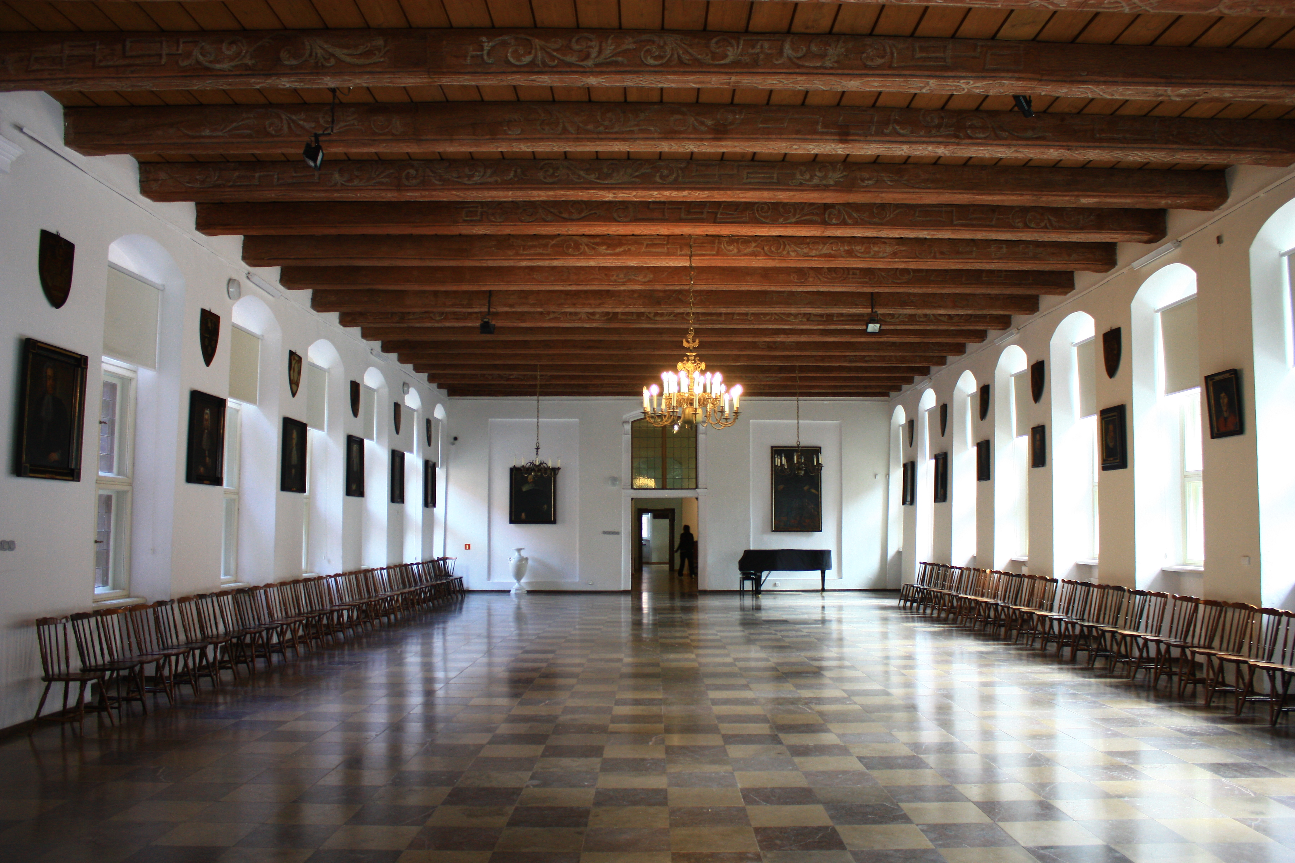 Toruń, ratusz staromiejski, ob. Muzeum Okręgowe, 2 poł. XIII, 1391-1399, 1861. Sala Mieszczańska na 1 piętrze.